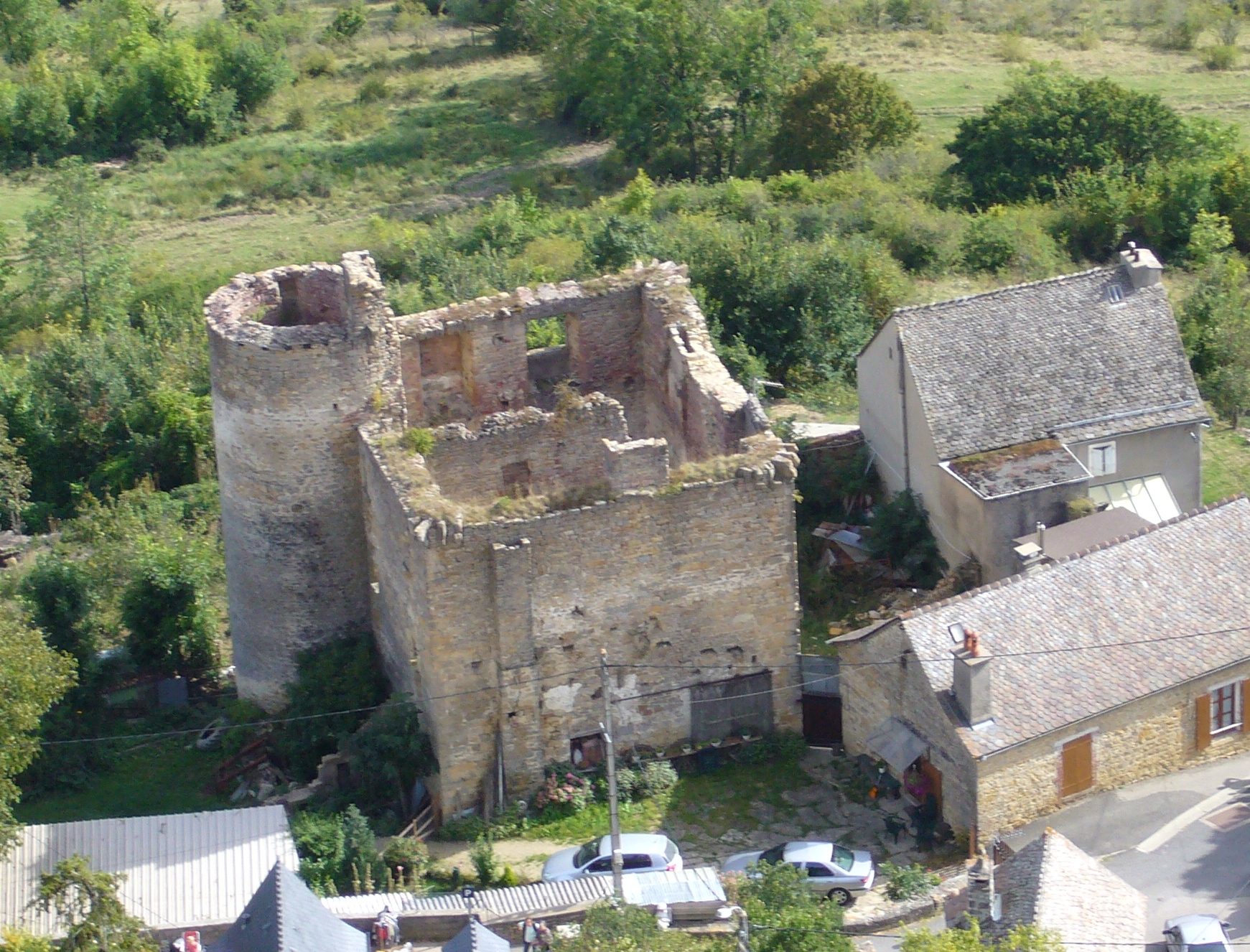 Village de Grèze (Lozère) prise depuis le Truc du même nom.